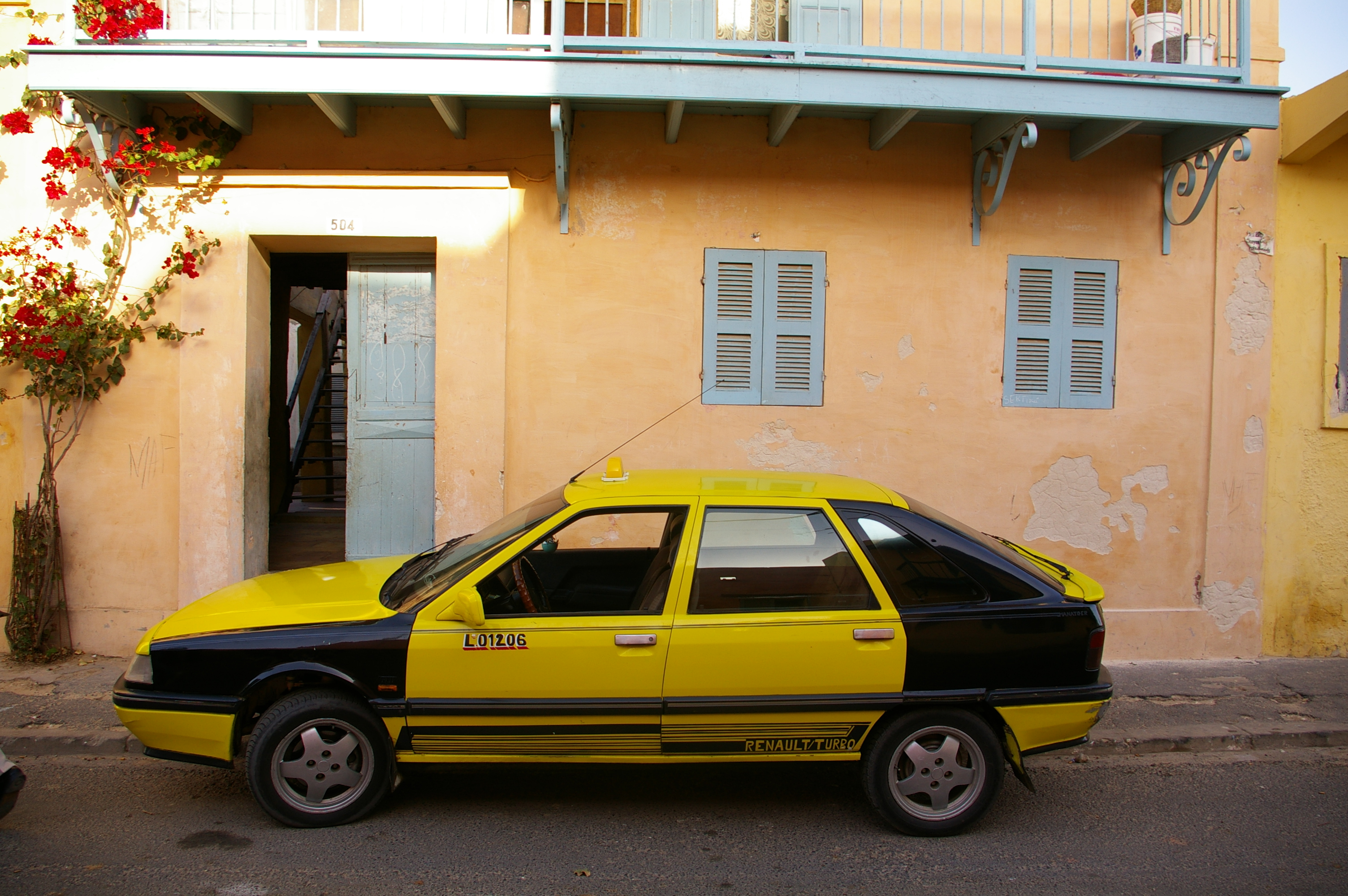 Parking Taxi in Saint Louis (Senegal)